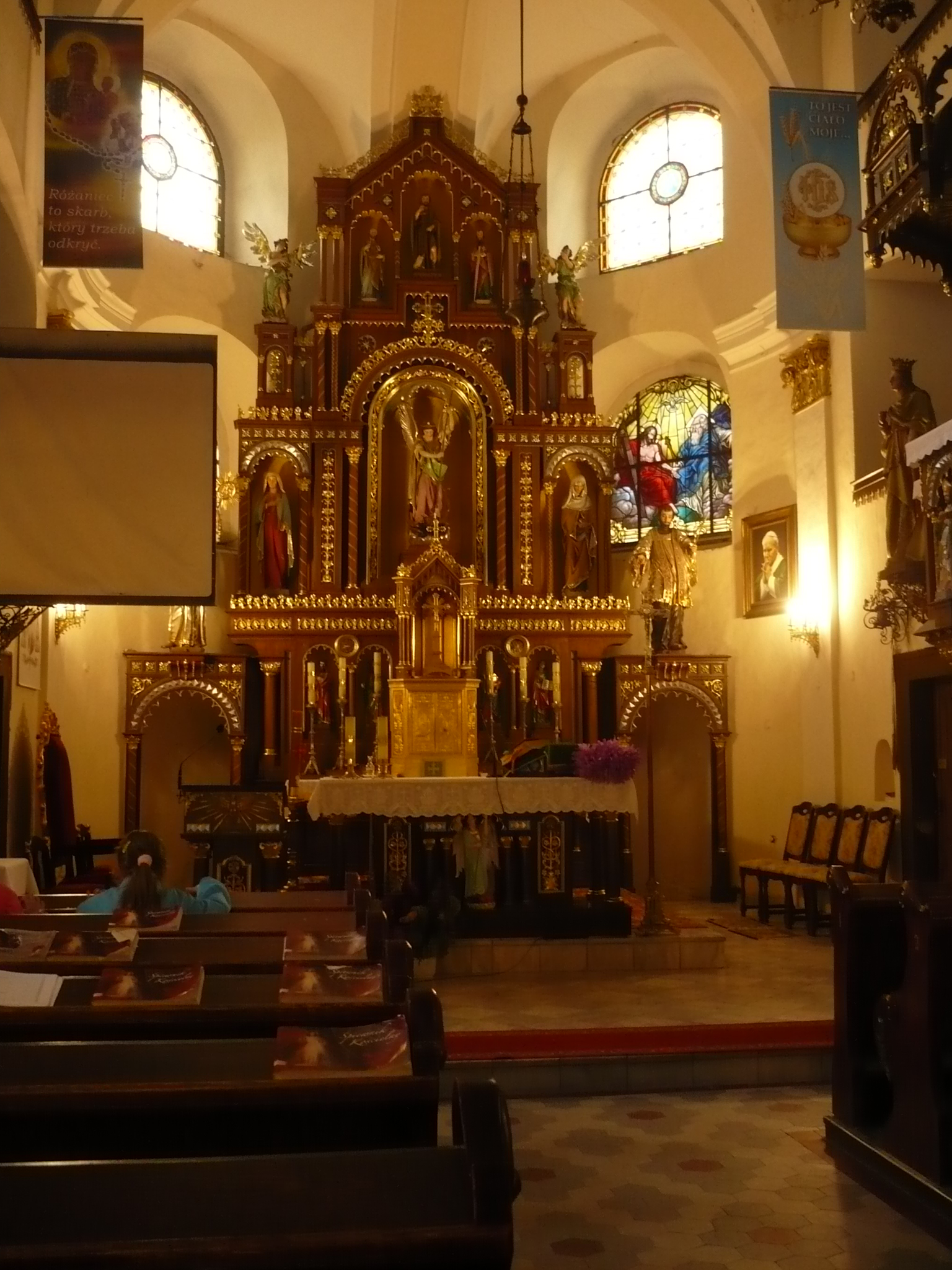 Ludwikowice Kłodzkie. Kościół pw. św. Michała Archanioła